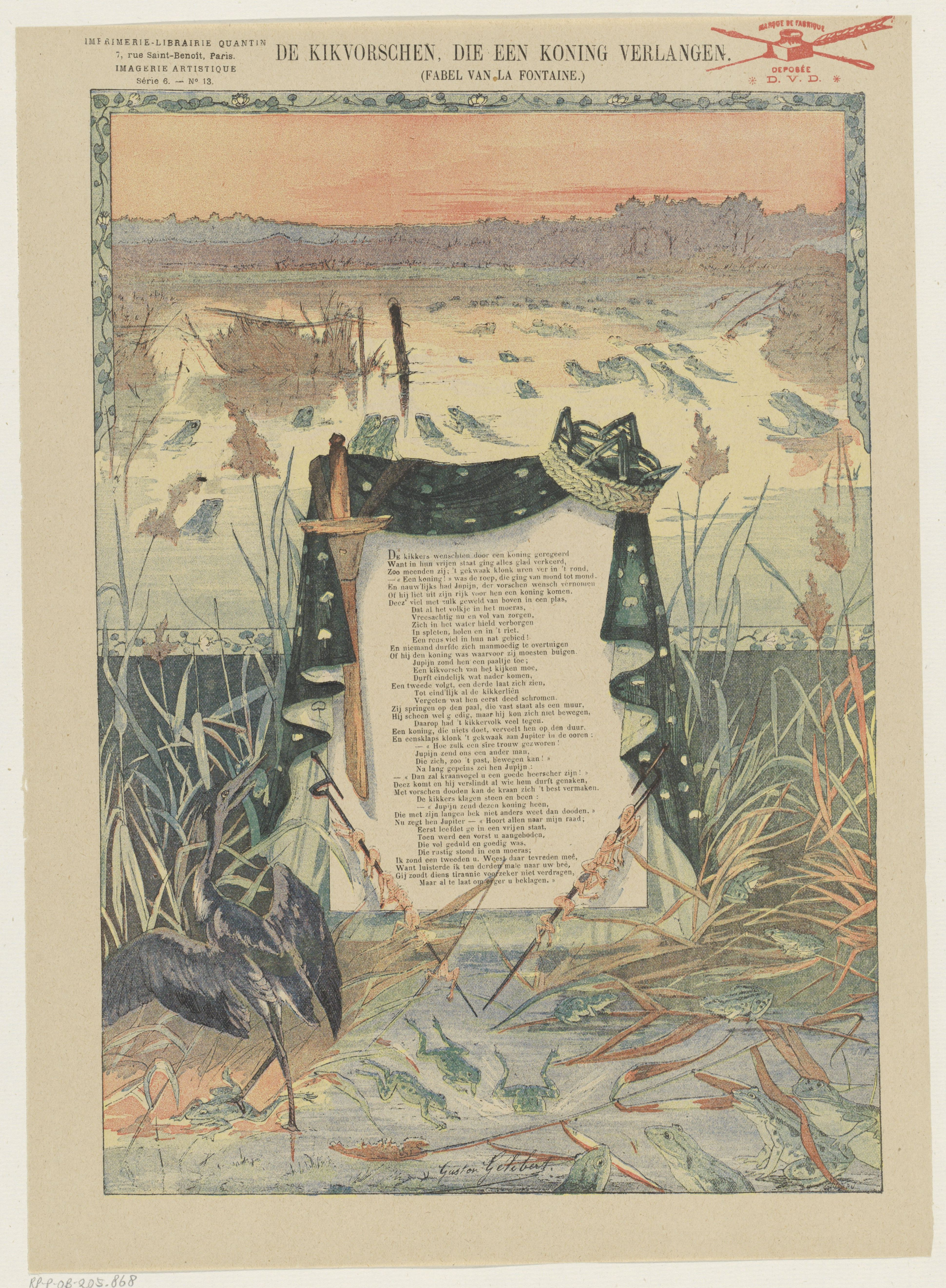 IdentificatieTitel(s): De kikvorschen, die een koning verlangen (titel op object)Fabel van La Fontaine (serietitel op object)Imagerie Artistique / Série 6 (serietitel op object)Objecttype: prent volksprent Serienummer: 13/20Objectnummer: RP-P-OB-205.868Opschriften / Merken: verzamelaarsmerk, verso, gestempeld: Lugt 2760octrooivermelding, recto rechtsboven, gestempeld: ‘marque de fabrique / deposée / * D.V.D. *’, rode stempel met inktpot, pen en schrijfveerOmschrijving: Blad met een grote voorstelling uit de fabel van Jean de La Fontaine, van de kikvorsen die een koning verlangen. In het midden een tekstblok met een vers. Genummerd linksboven: Série 6. - No. 13.VervaardigingVervaardiger: ontwerper: Gaston Gélibert (vermeld op object)prentmaker: onbekend (vermeld op object)uitgever: Albert Quantin (vermeld op object)Plaats vervaardiging: ParijsDatering: 1876 - 1890 en/of 1888Fysieke kenmerken: kleurenlithografie en tekst in boekdrukMateriaal: papier Techniek: kleurenlithografie (procedé) / boekdrukAfmetingen: blad: h 367 mm × b 267 mmOnderwerpWat: fabelstailless amphibians: frogVerwerving en rechtenCredit line: Schenking van de heer F.G. Waller, AmsterdamVerwerving: schenking 1923Copyright: Publiek domein